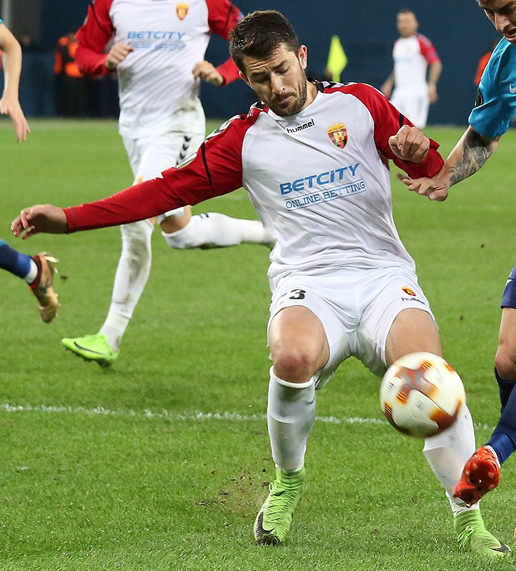 Besir Demiri